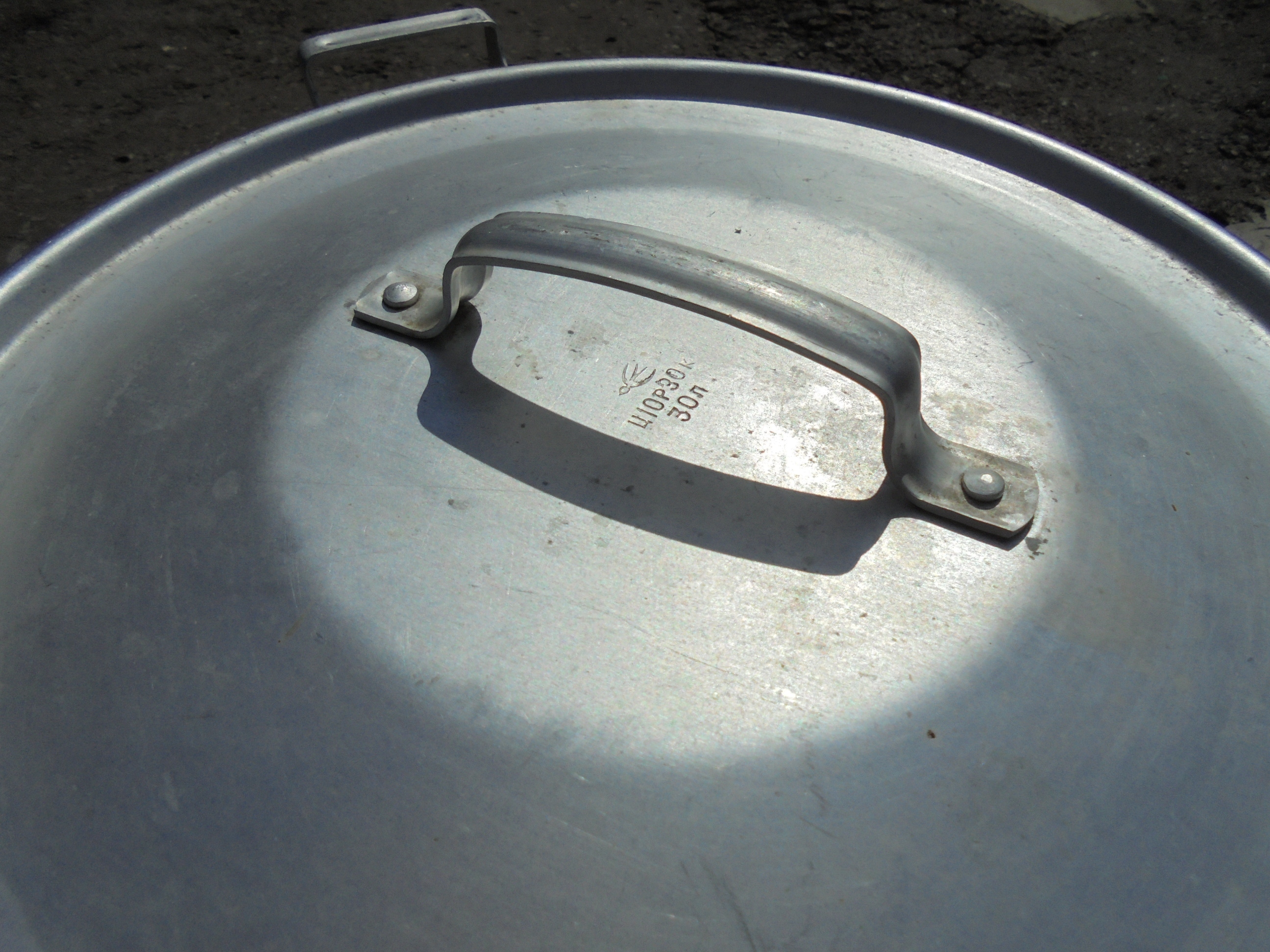 Кастрюля ёмкостью 30 литров производства Белокалитвинского металлургического завода - логотип завода на крышке